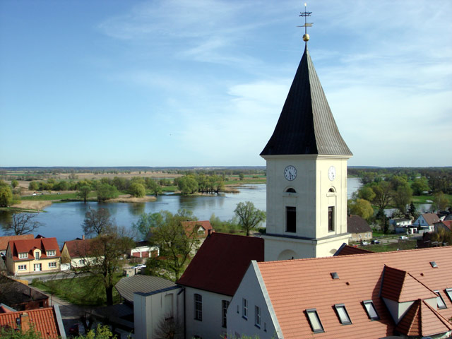 Lebus - Unterstadt